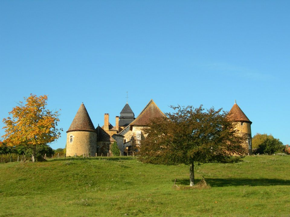 église fortifiée. Vue vers l'ouest.